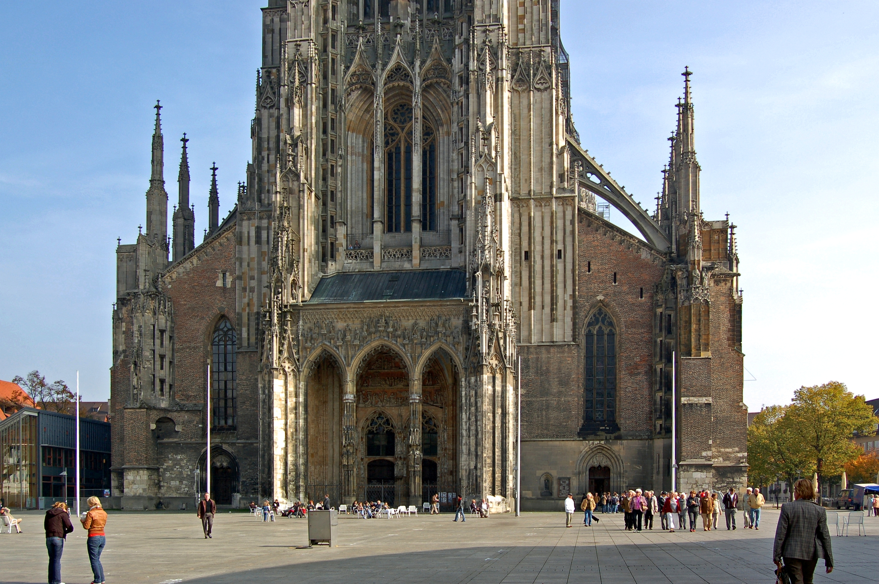 Vom Mittelalter bis in die Neuzeit sind es in Ulm nur ein paar Schritte. Das gotische Münster mit dem höchsten Kirchturm der Welt steht nicht weit entfernt neben der »Neuen Mitte« Ulms mit ihrer modernen Architektur. Überragt wird die Stadt vom 161 Meter hohen Turm des Münsters, einem Meisterwerk gotischer Baukunst. Das Mittelschiff alleine hat eine Länge von 124 Meter. Im Jahre 1377 wurde mit dem Bau begonnen, der sich bis 1543 hingezogen hat und fast vollendet war. Von 1844 bis 1890 erfolgte eine erneute, zweite Bauphase. Die Fliegerangriffe im 2. Weltkrieg haben dem Dom wenig zugesetzt; Schäden wurden danach einer Restaurierung unterzogen. Bis heute verlangt der Dom eine ständige Sanierungsleistung.